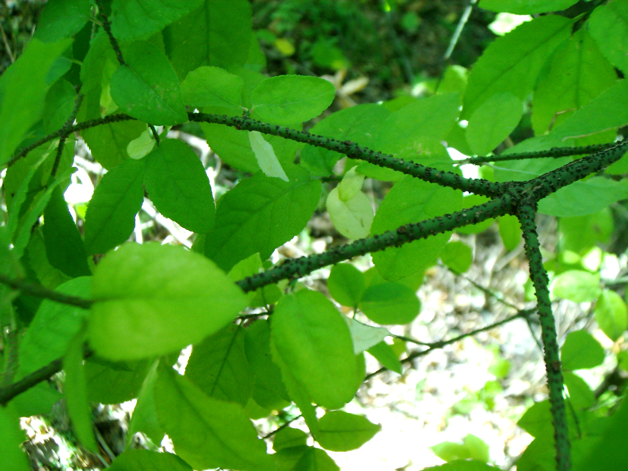 Euonymus verrucosa